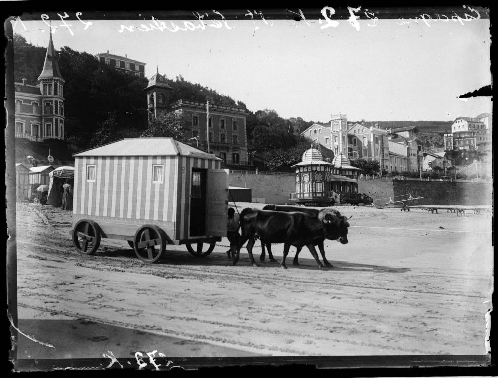 Donostia - San Sebastian hacia 1908.